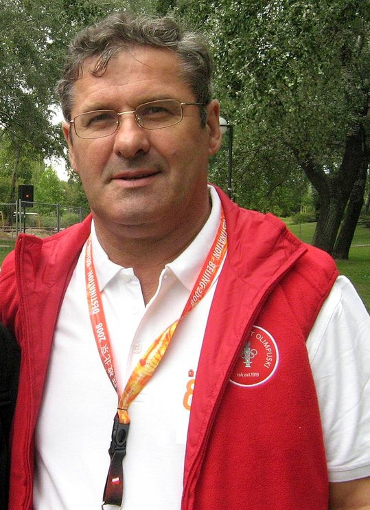 Zygmunt Józef Anczok (ur. 14 marca 1946 w Lublińcu), polski piłkarz